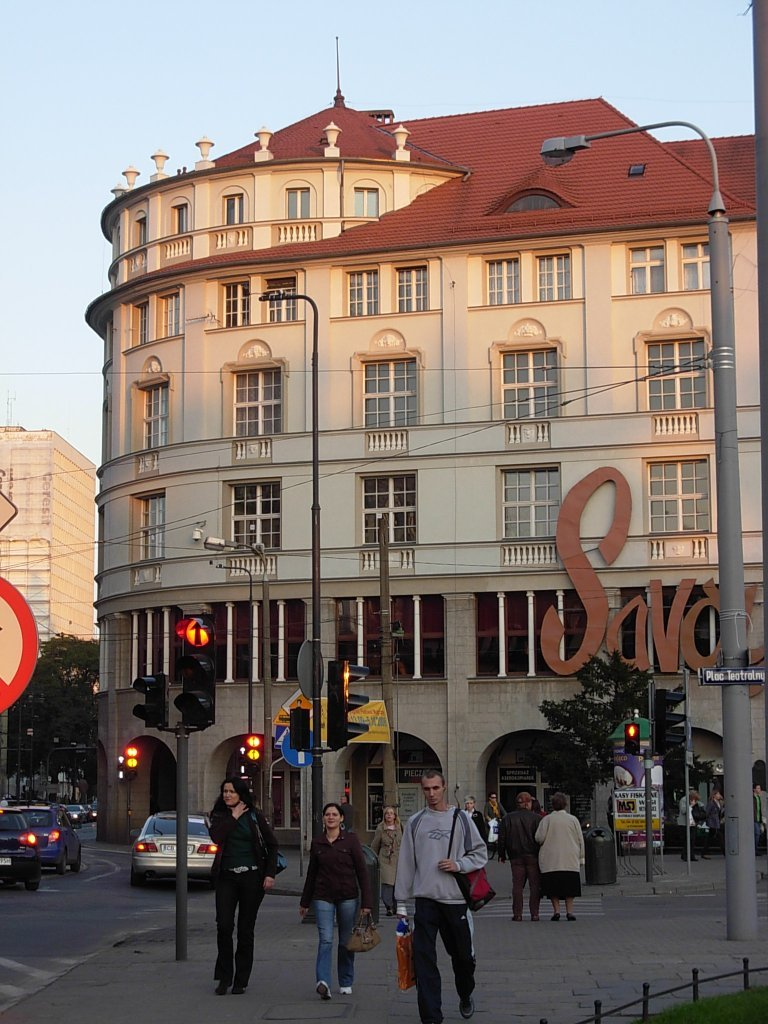 Kamienica Plac Teatralny 6 w Bydgoszczy